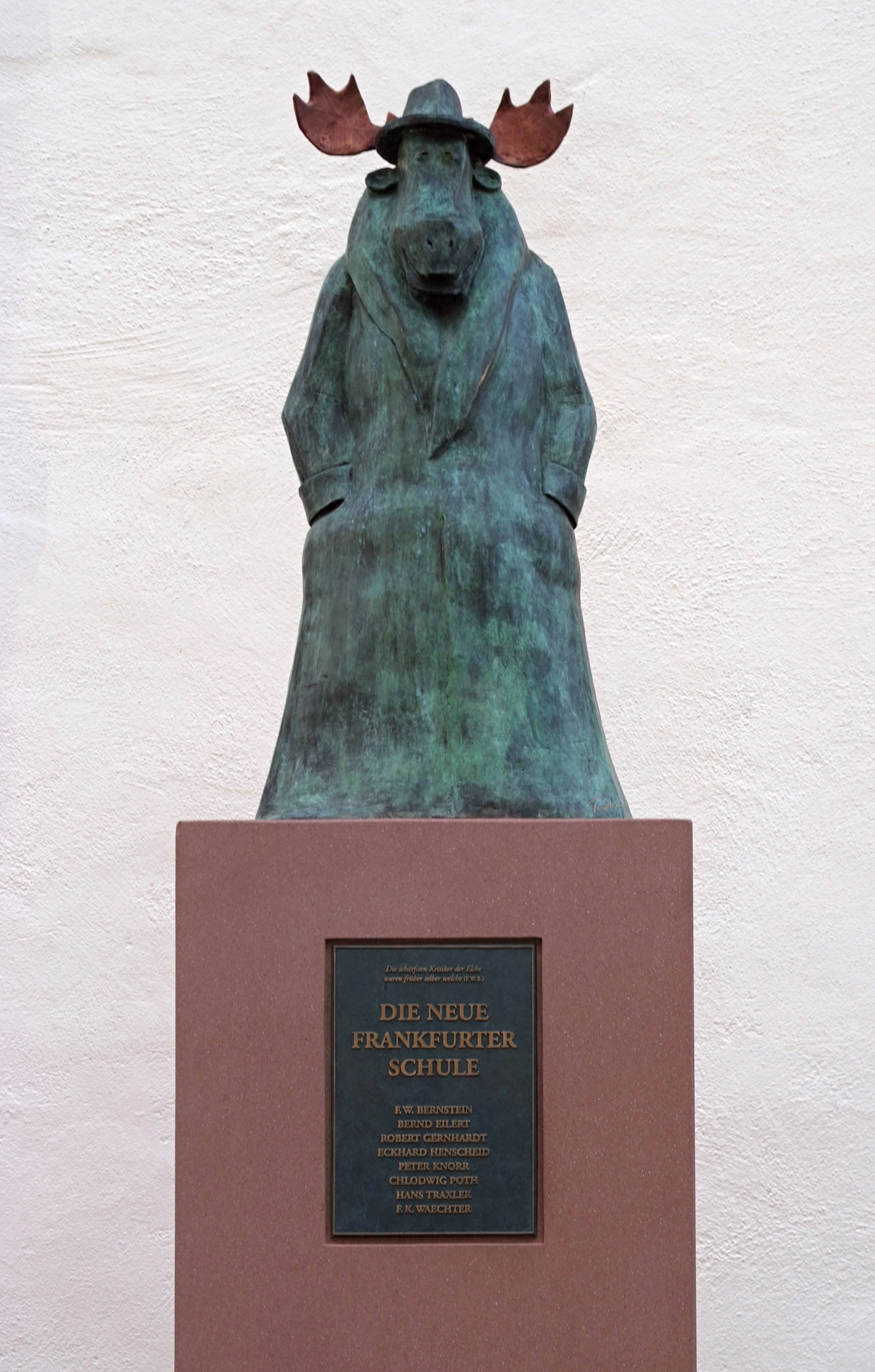 Die schärfsten Kritiker der Elchewaren früher selber welche